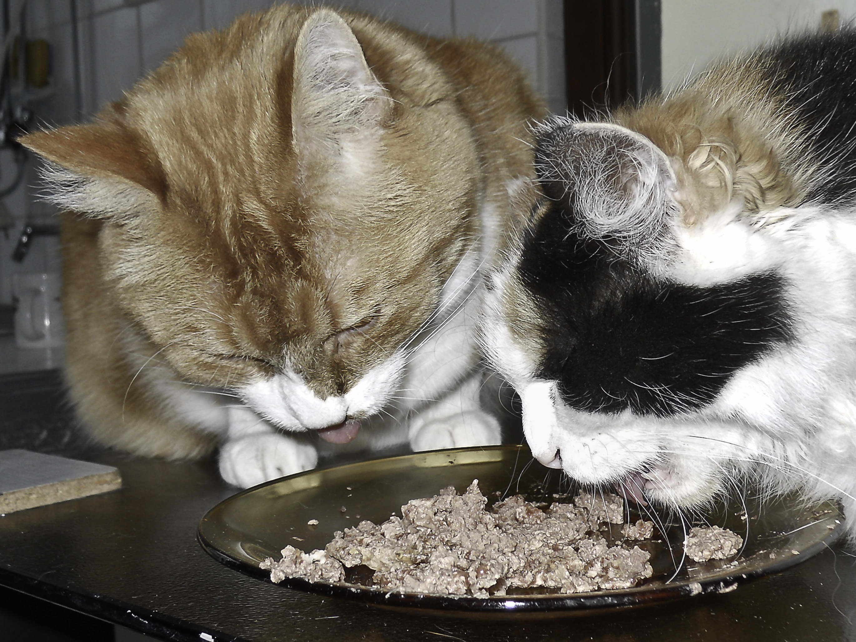 Katten eten zonder ruzie te maken